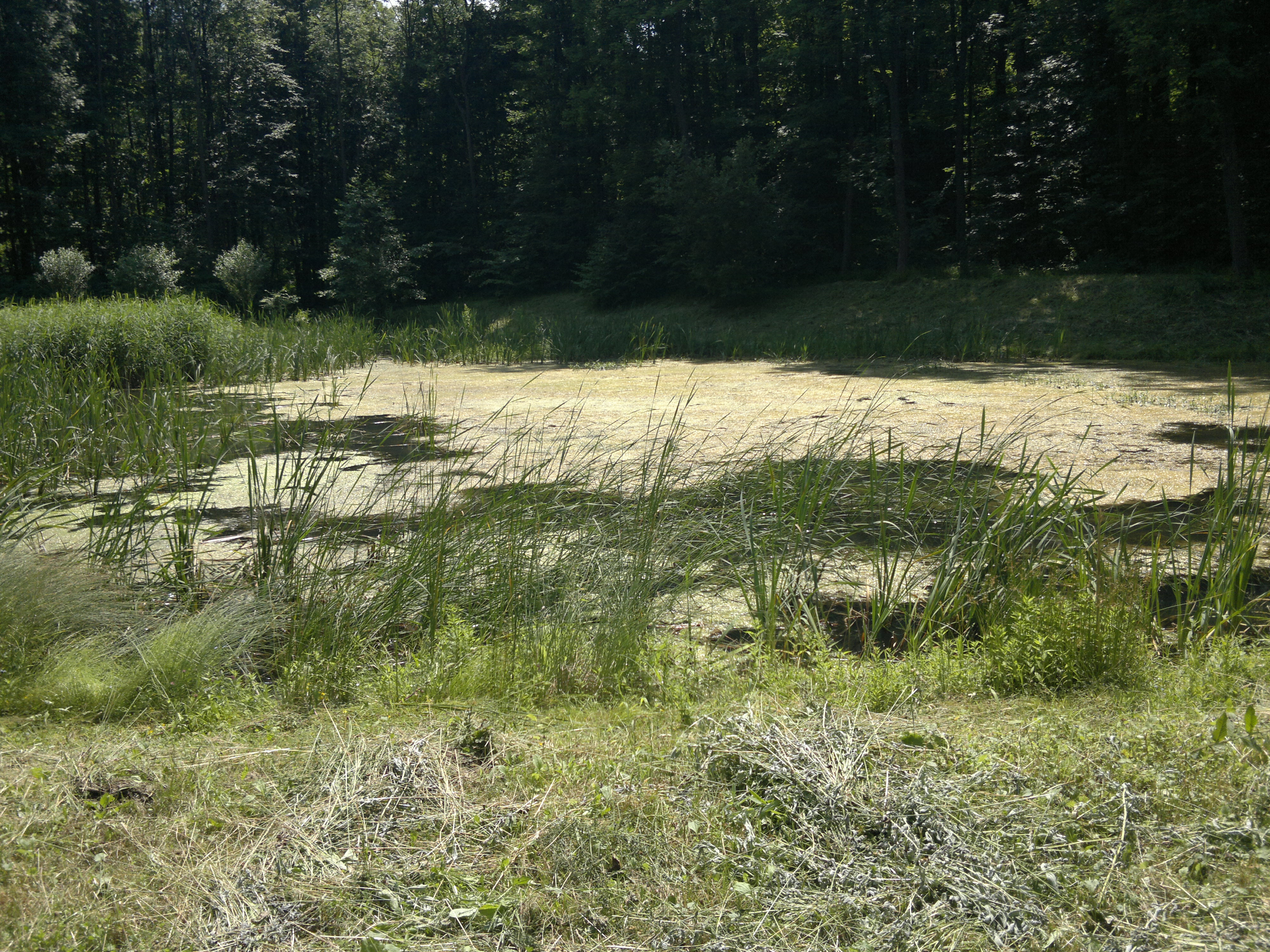 Bývalý hradní rybník hradu Šostýna; Kopřivnice (CZ)